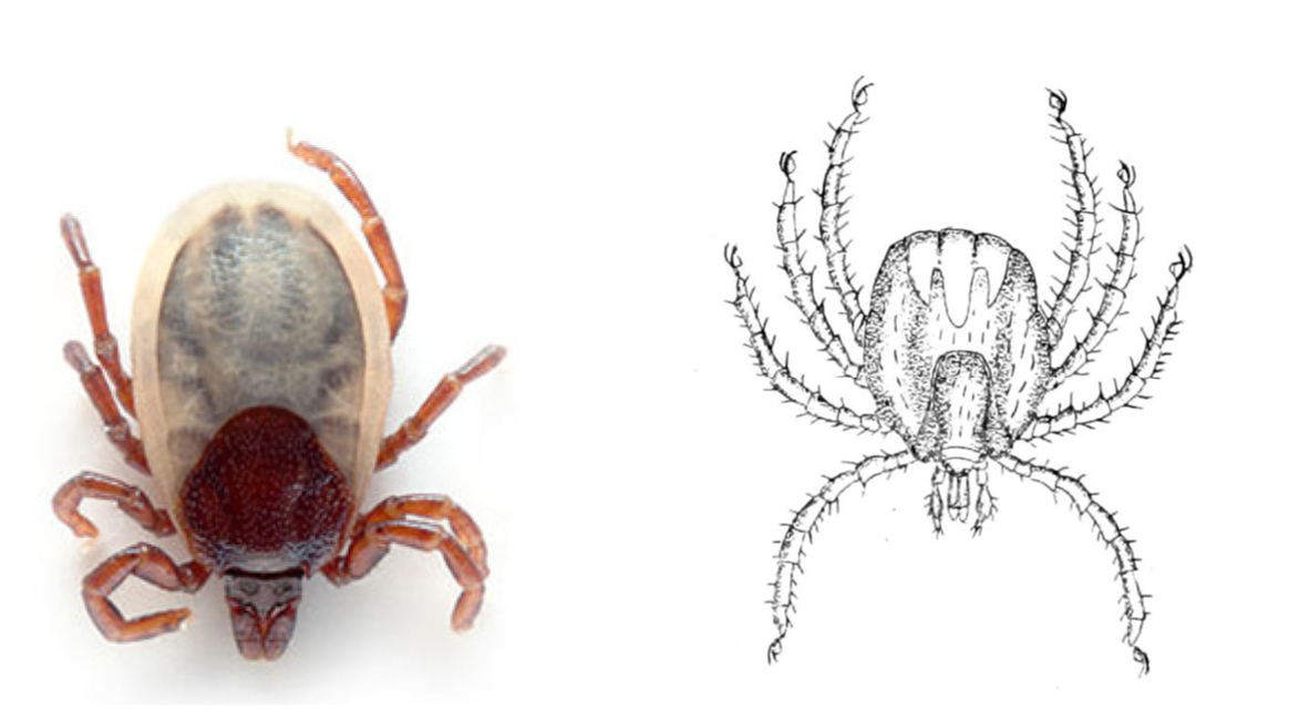 da i pesci